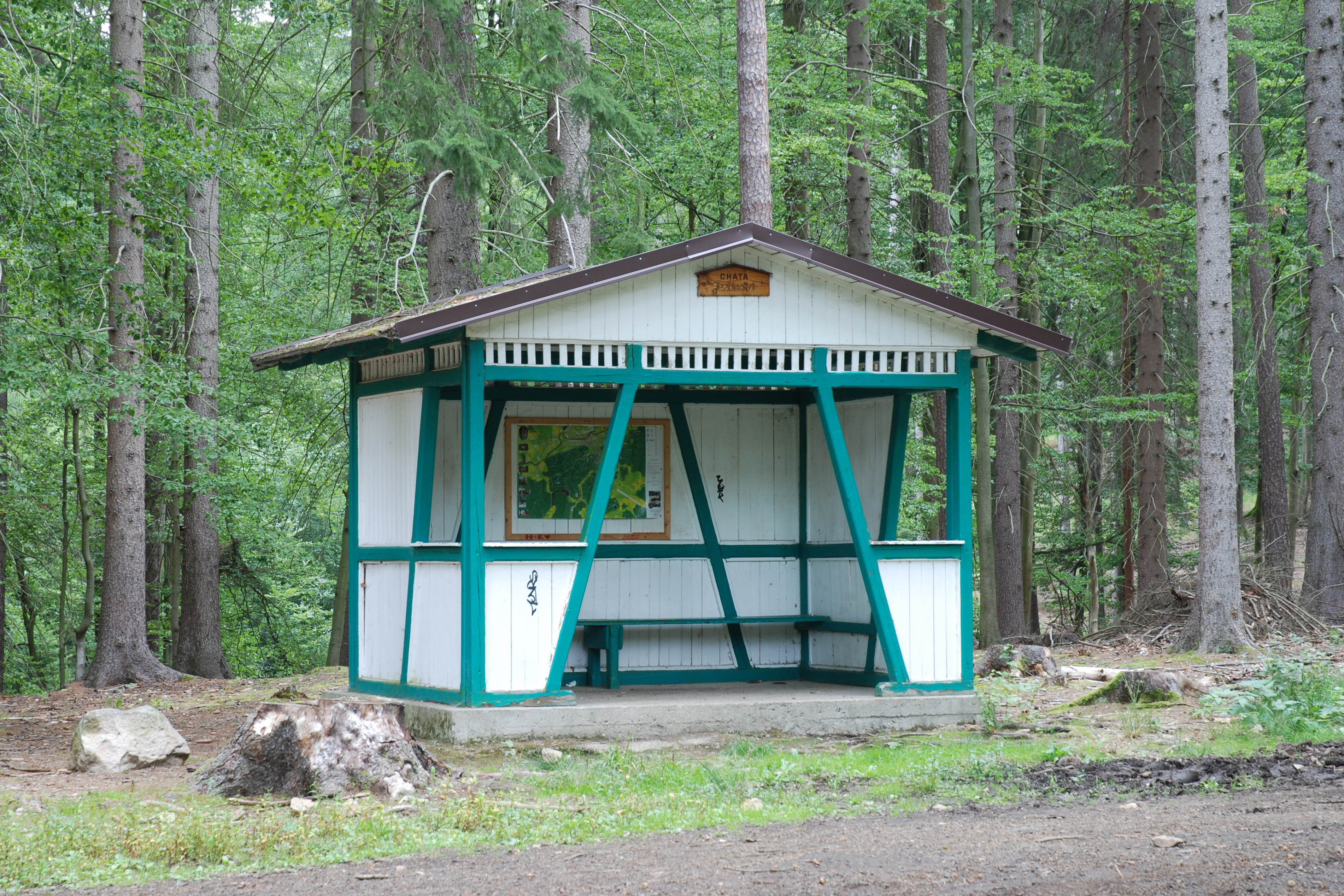 Jezdecká chata v karlovarských lázeňských lesích